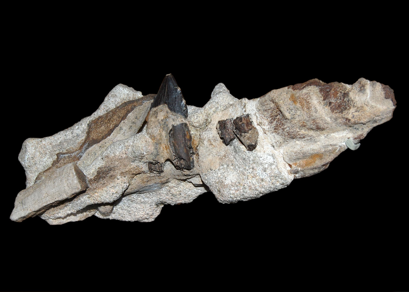 Naturhistorisches Museum Wien